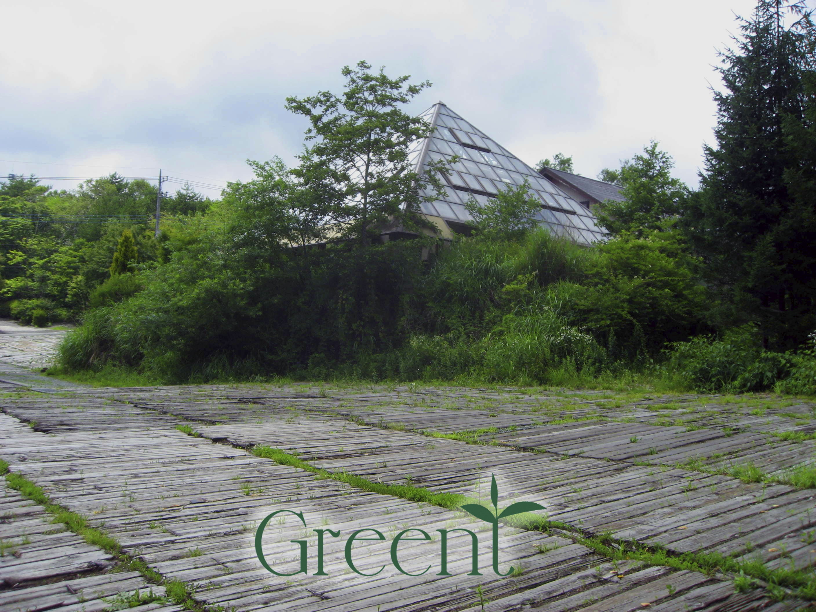 GreenT社屋